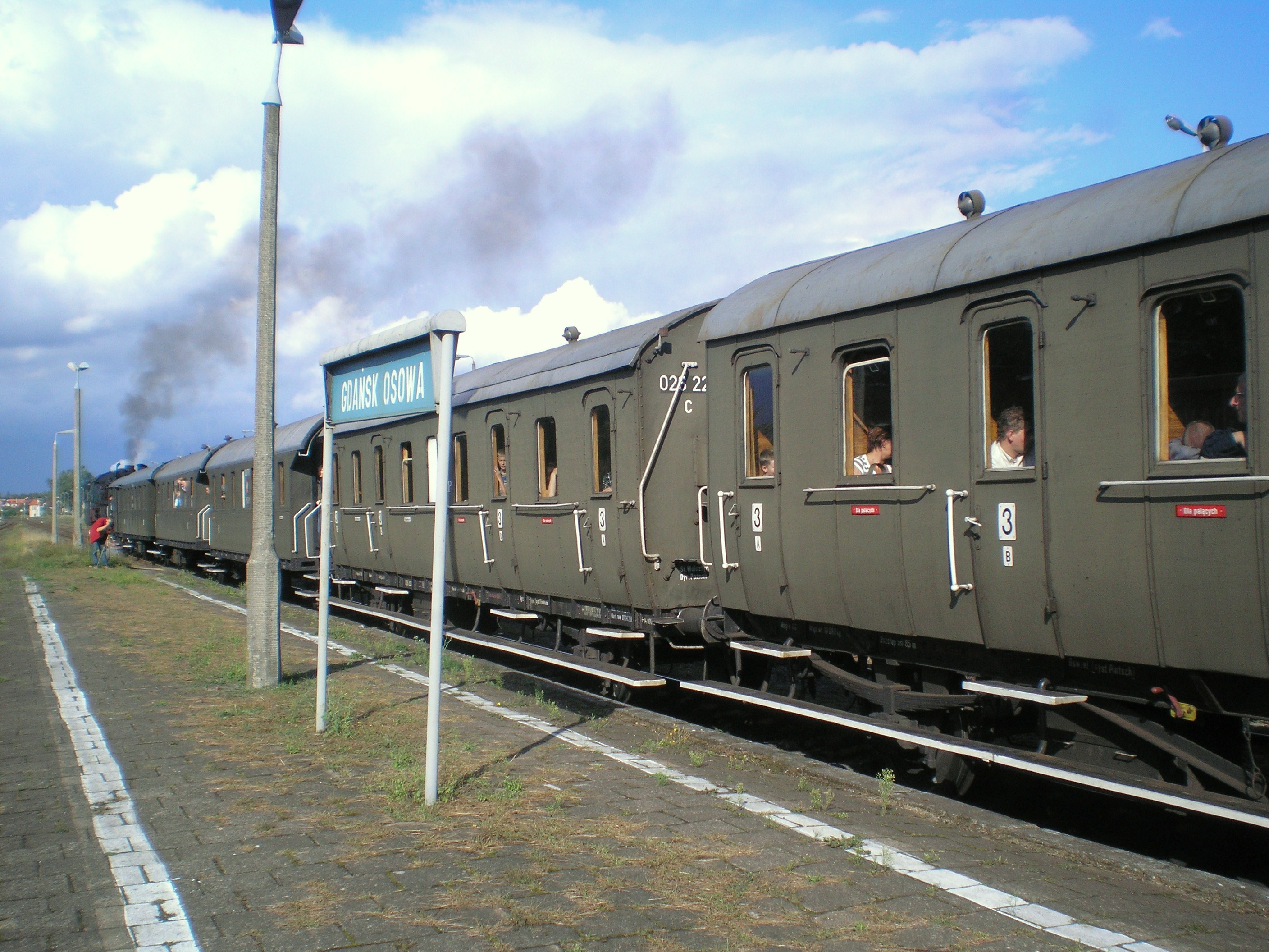 Gdańsk Osowa, stacja kolejowa, okolicznościowy skład retro. Wagony typu "boczniak".